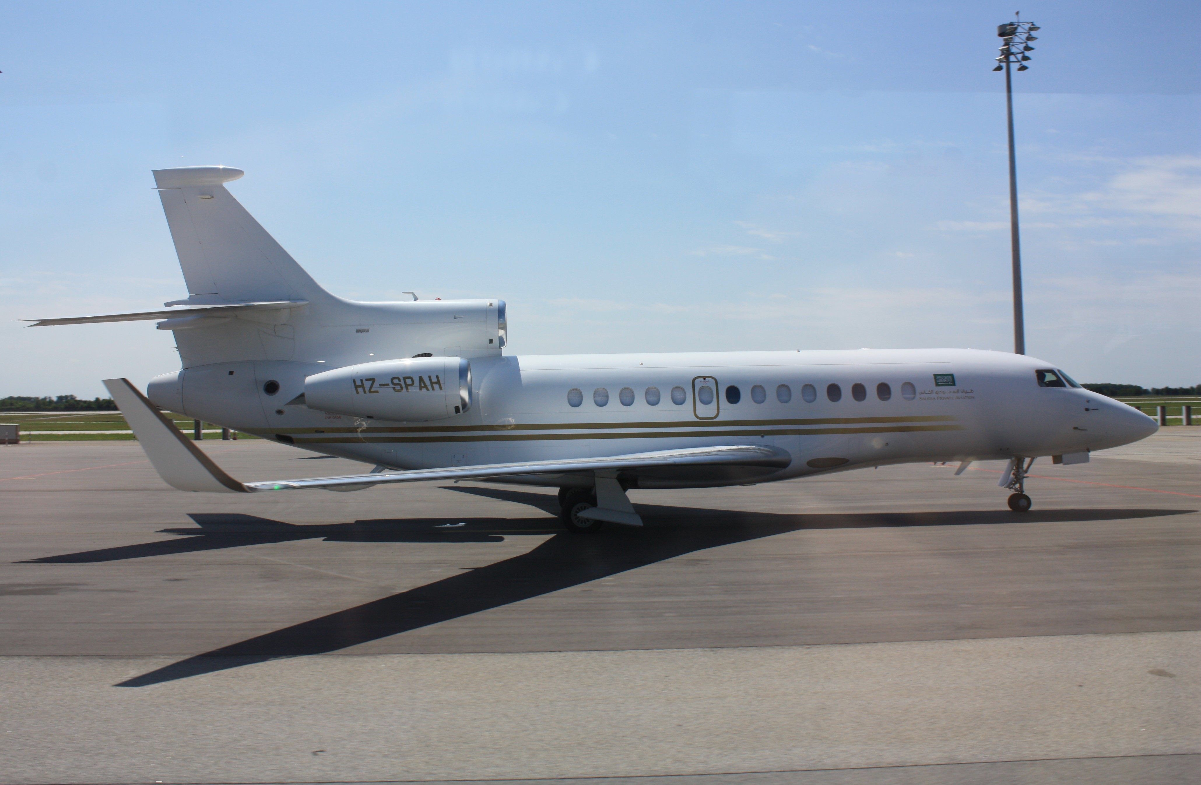 HZ-SPAH Dassault Falcon 7X (Privatflugzeug aus Saudi-Arabien) am Flughafen München